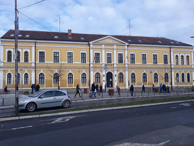 Народни музеј Краљево